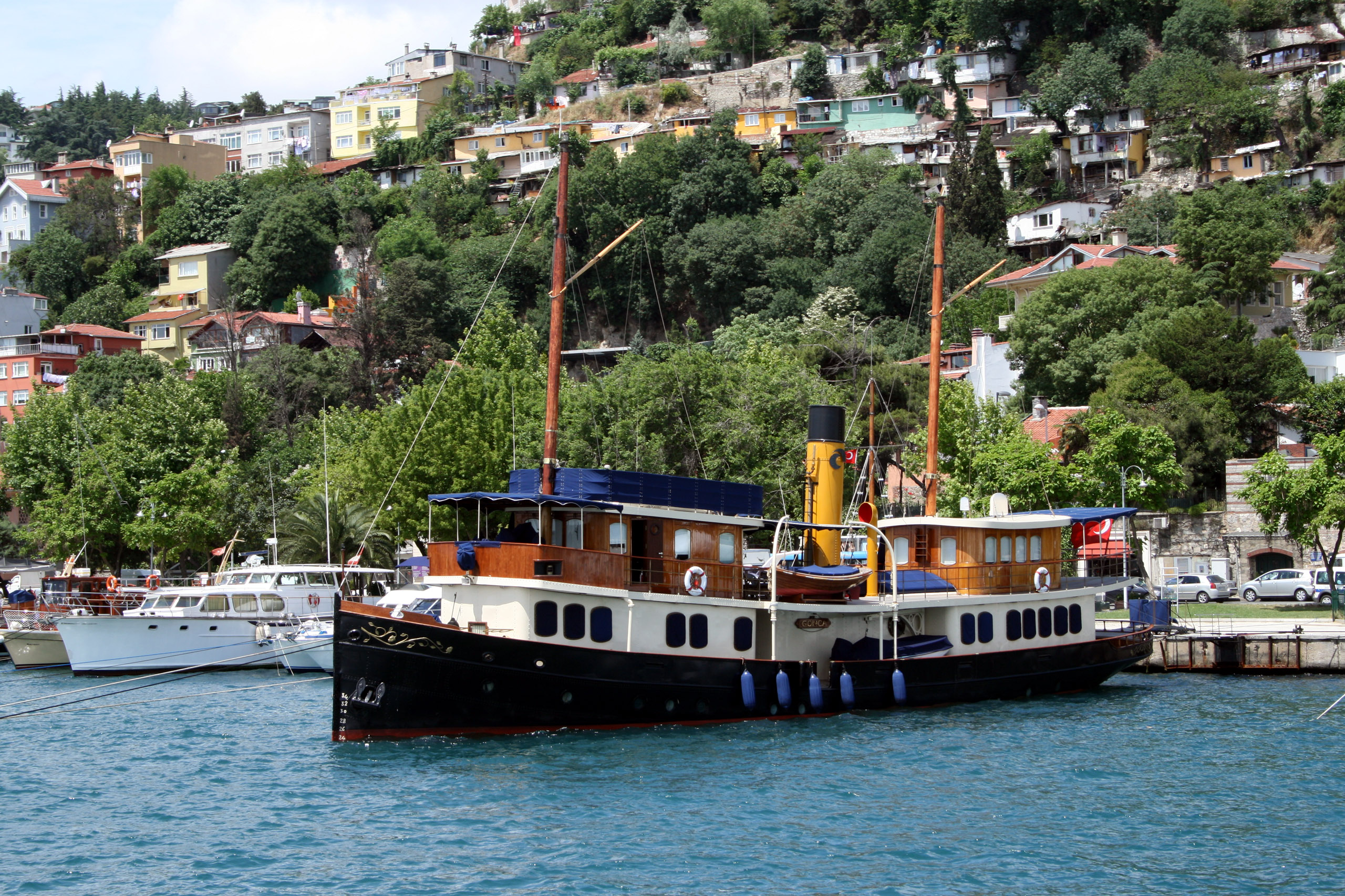 Le Gonca dans le Bosphore